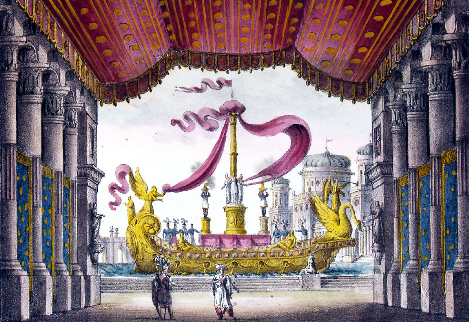 Décor du troisième tableau de l'Acte I de Il crociato in Egitto de Meyerbeer par Alessandro Sanquirico pour la première à La Scala de Milan (1826)